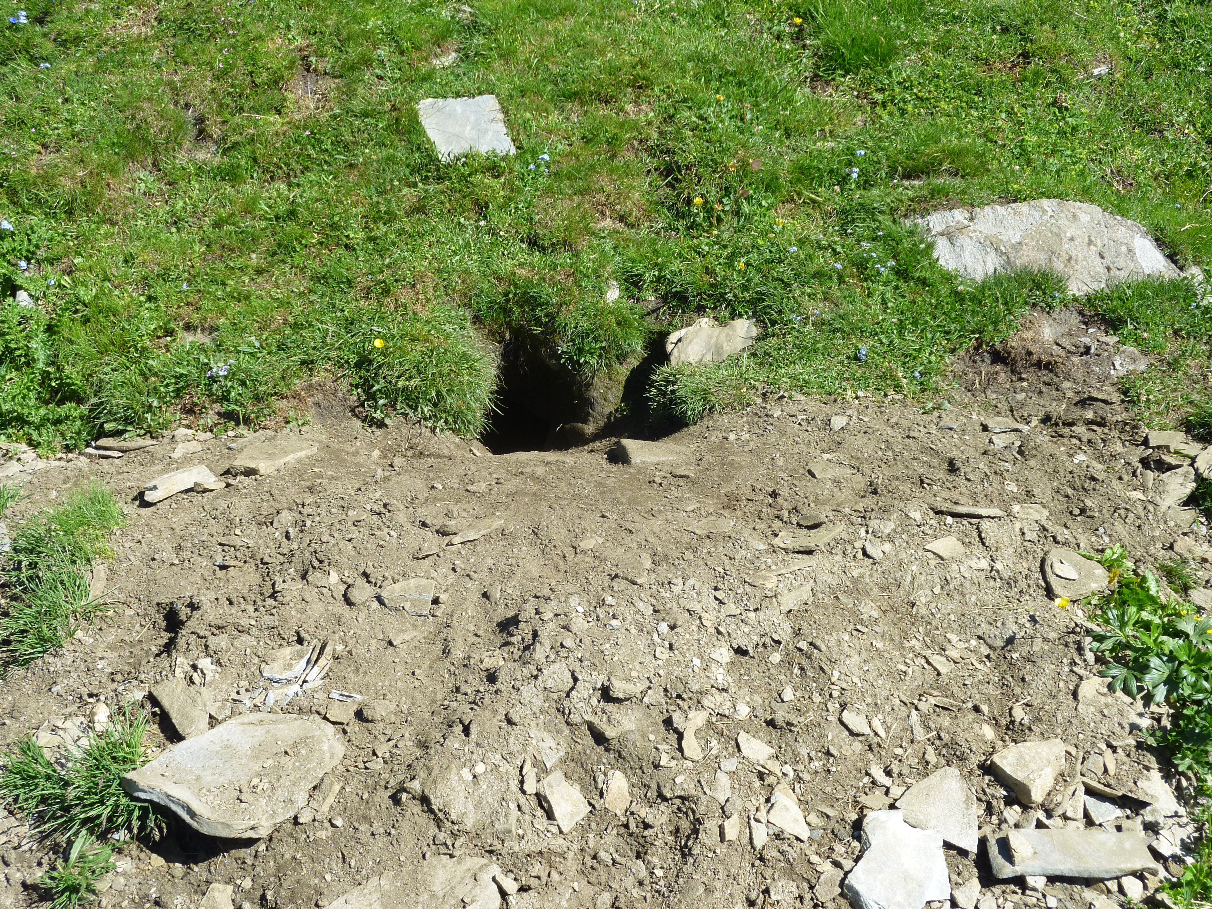 Murmeltierbau